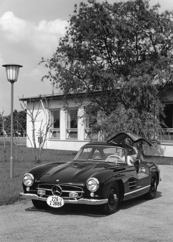 Daimler-Benz A.G. Werk Sindelfingen Typ 300 SL